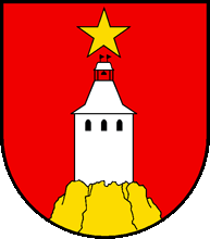 Wappen von La Tour-de-Trème Kanton Freiburg